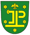 Znak města Hlučín